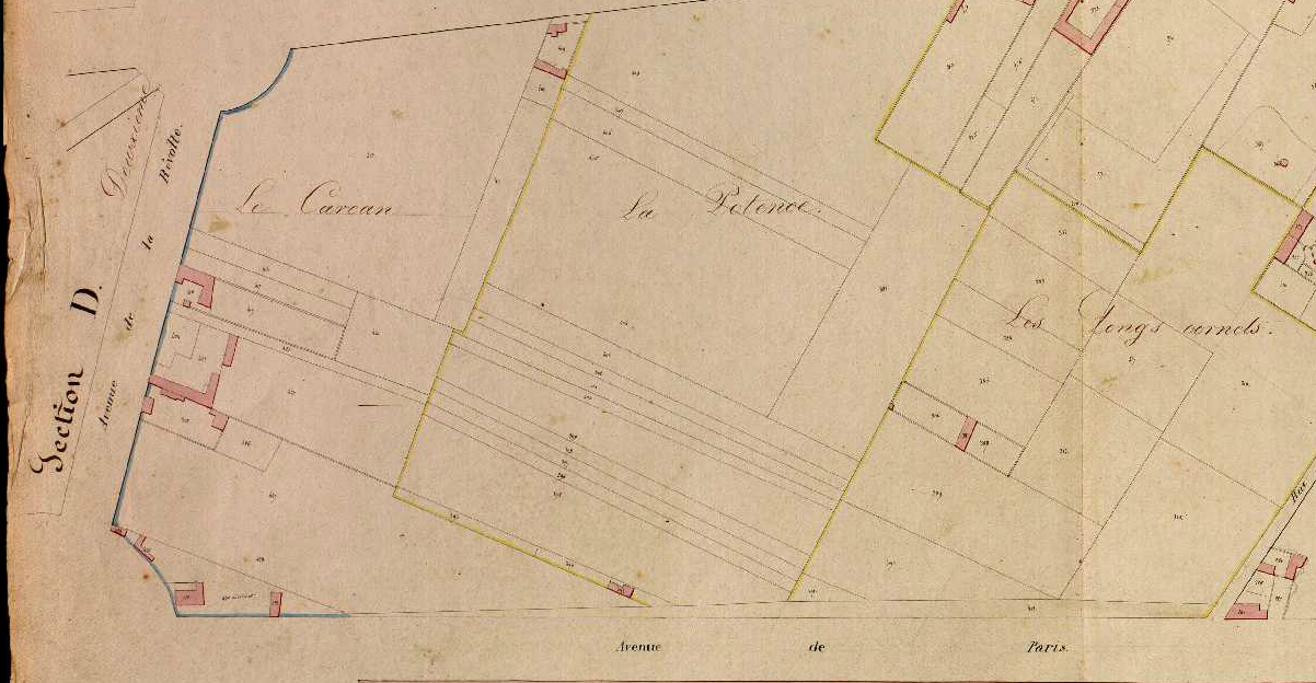 Paris, porte Maillot, plan cadastral de la section B, dite des Thermes,(1825)